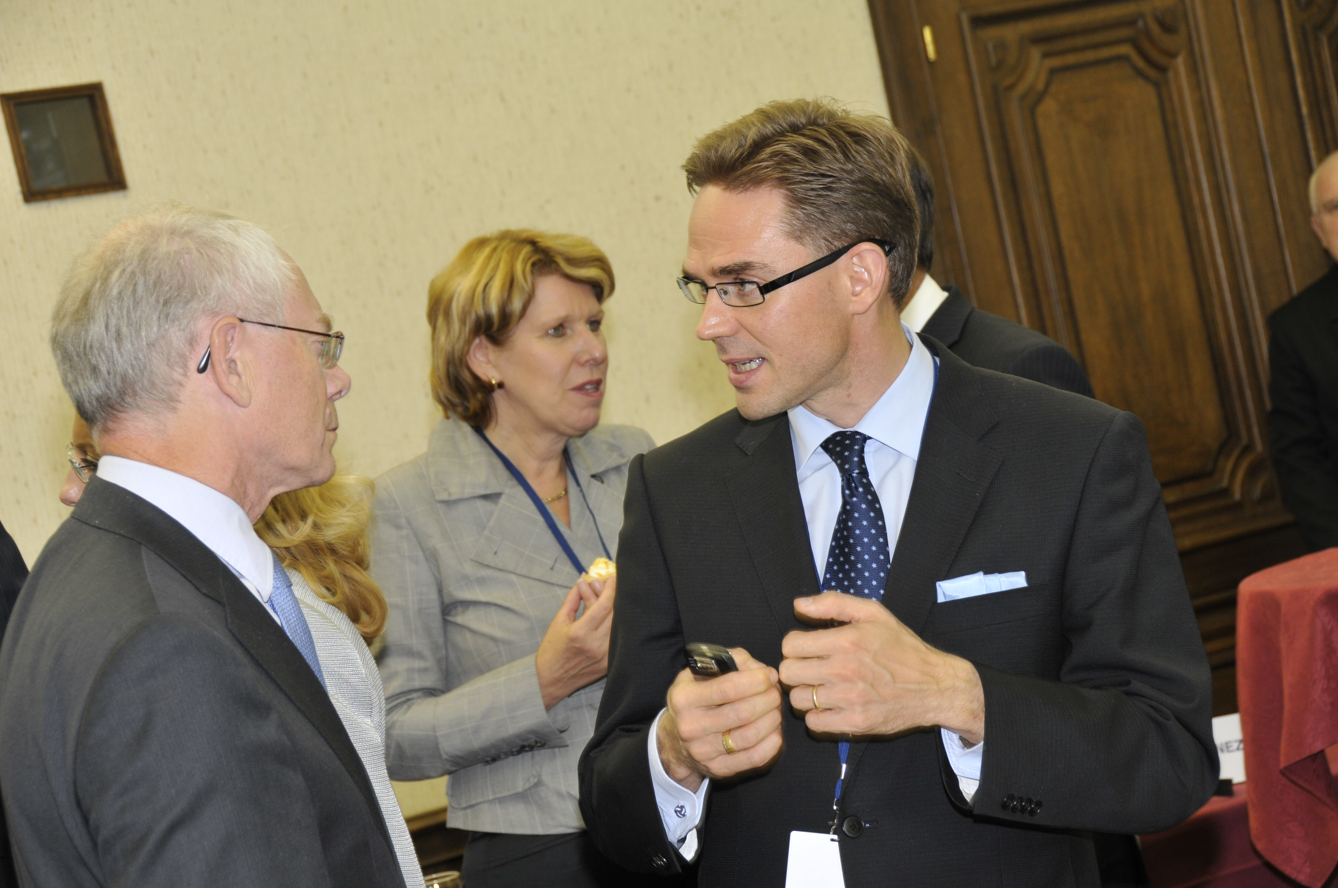 EPP Summit September 2010